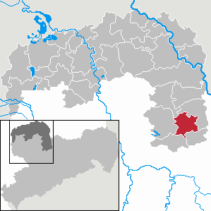 Oschatz in Saxony - Landkreis Nordsachsen